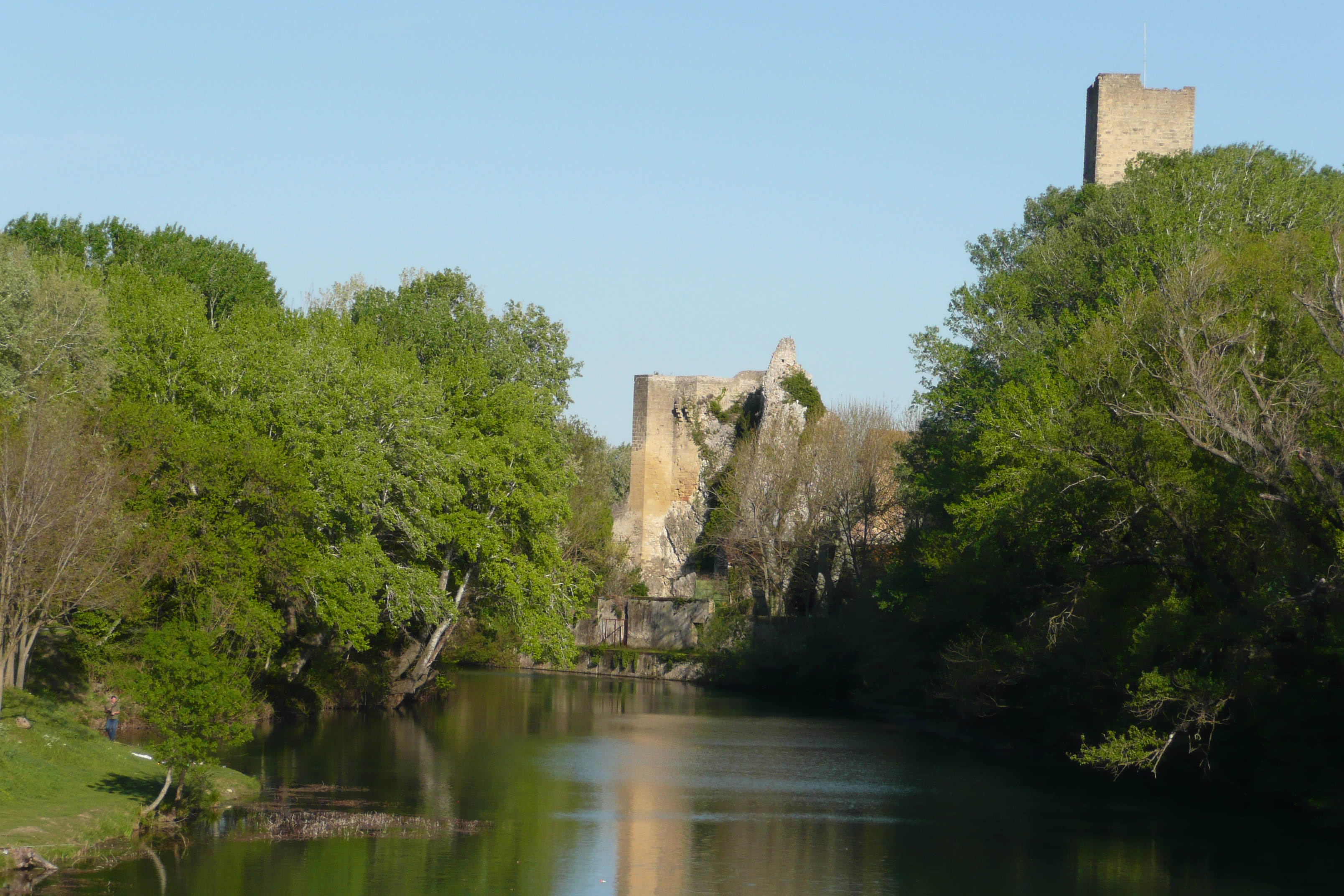 Tour et bras du Rhône à Roquemaure